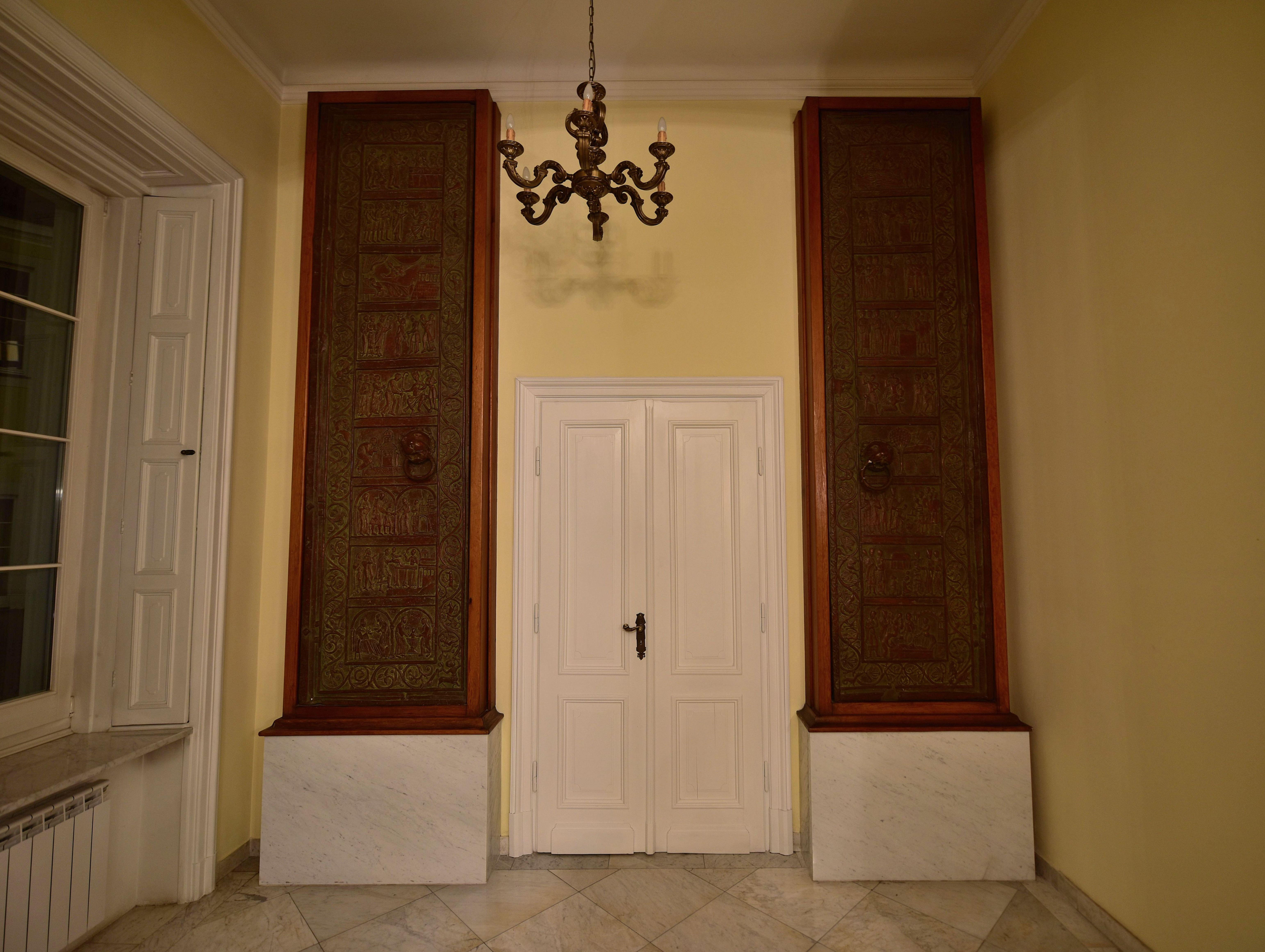 Replika Drzwi Gnieźnieńskich na parterze pałacu Borchów (Domu Arcybiskupów Warszawskich) przy ul. Miodowej 17/19 w Warszawie